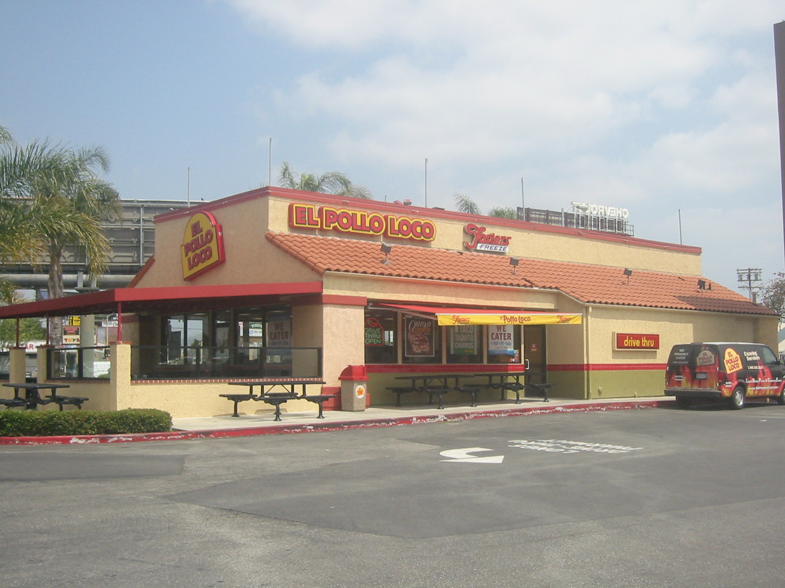 El Pollo Loco restaurant in Los Angeles, California